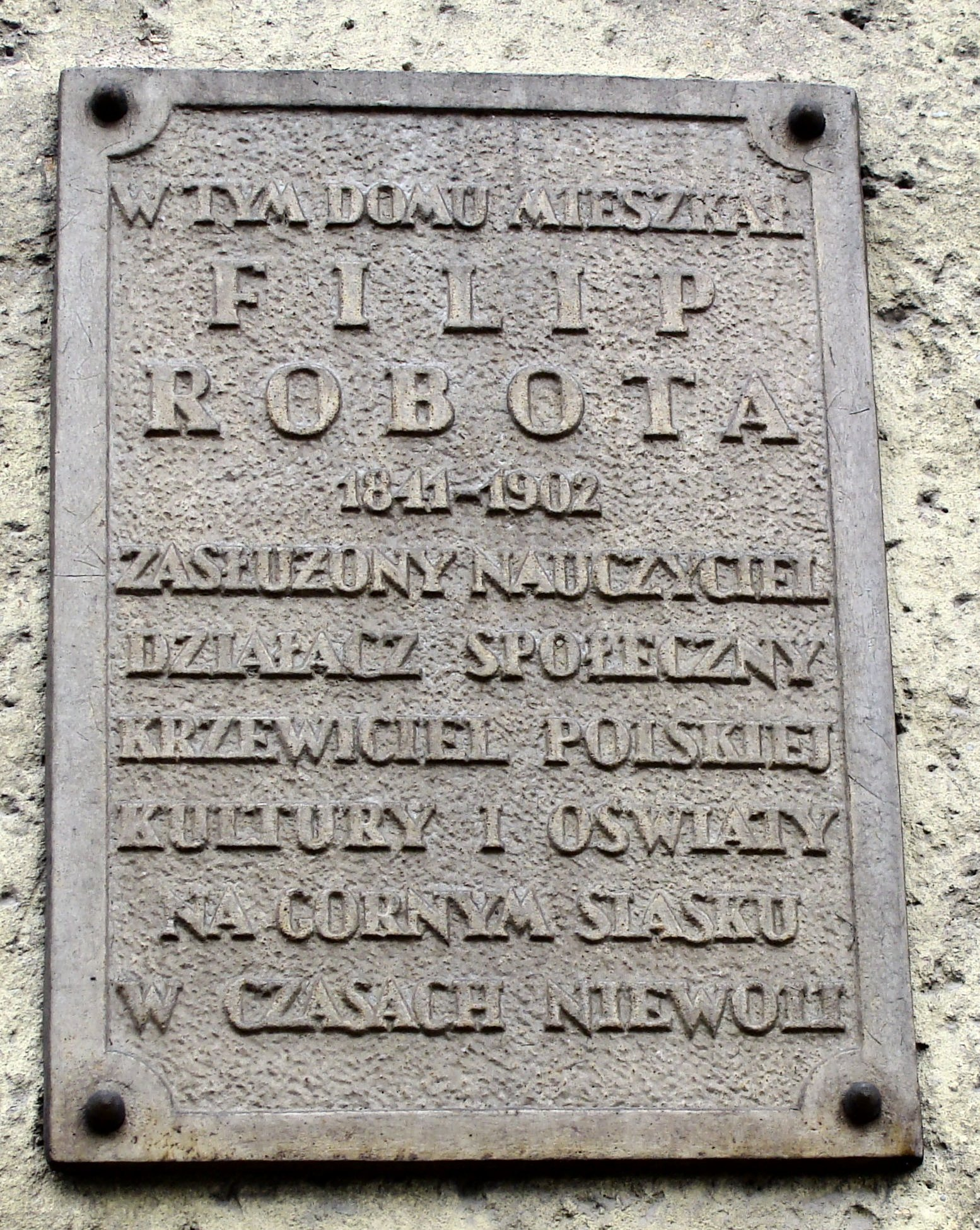 Prudnik, Tablica pamiątkowa Filipa Roboty, polskiego działacza oświatowego na Śląsku